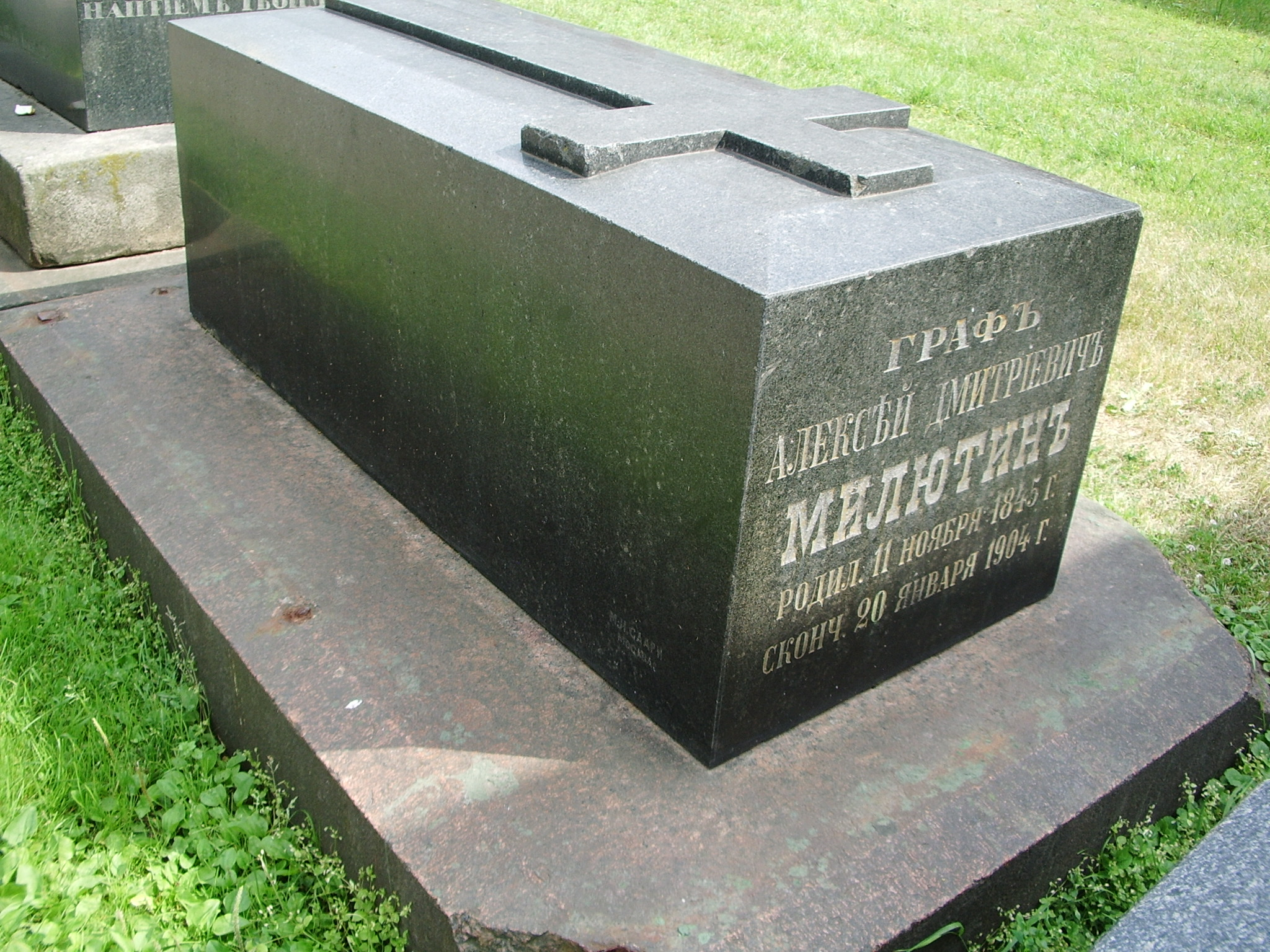 Могила Алексея Дмитриевича Милютина в некрополе Новодевичьего монастыря